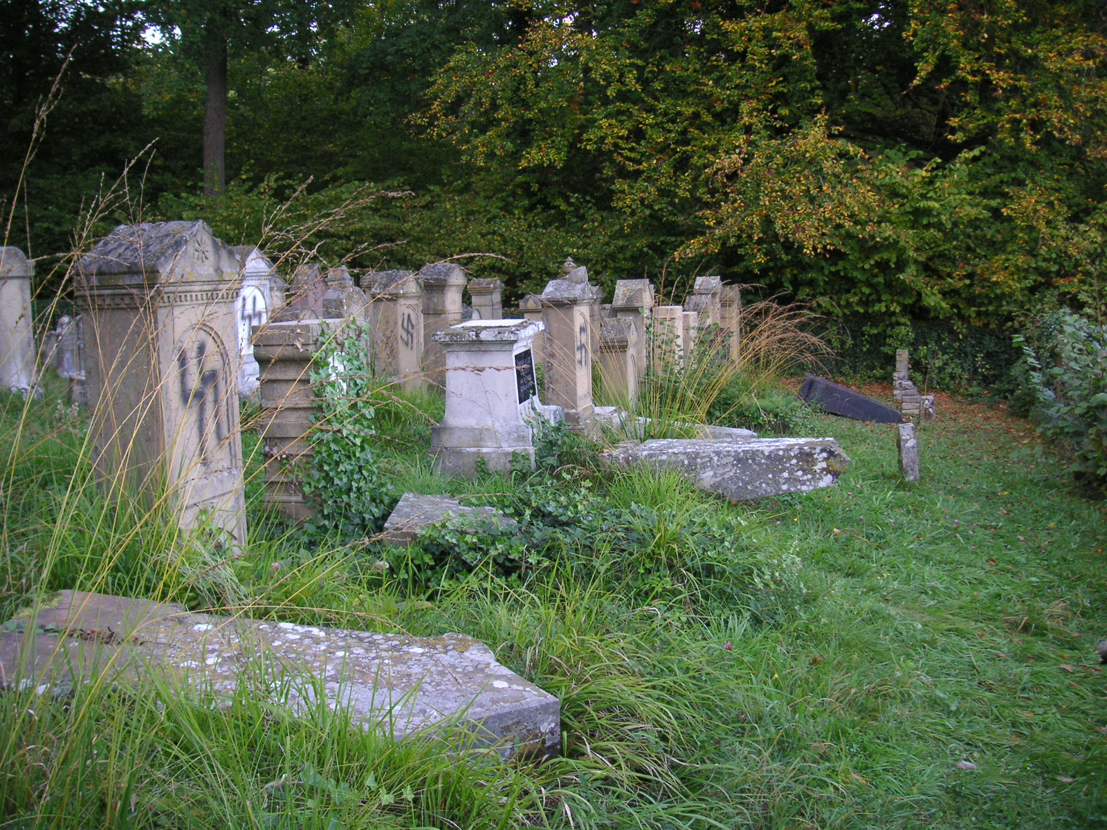 Zweiter Jüdischer Friedhof in Freudental Kreis Ludwigsburg nach der Schändung vom 1. Oktober 2007